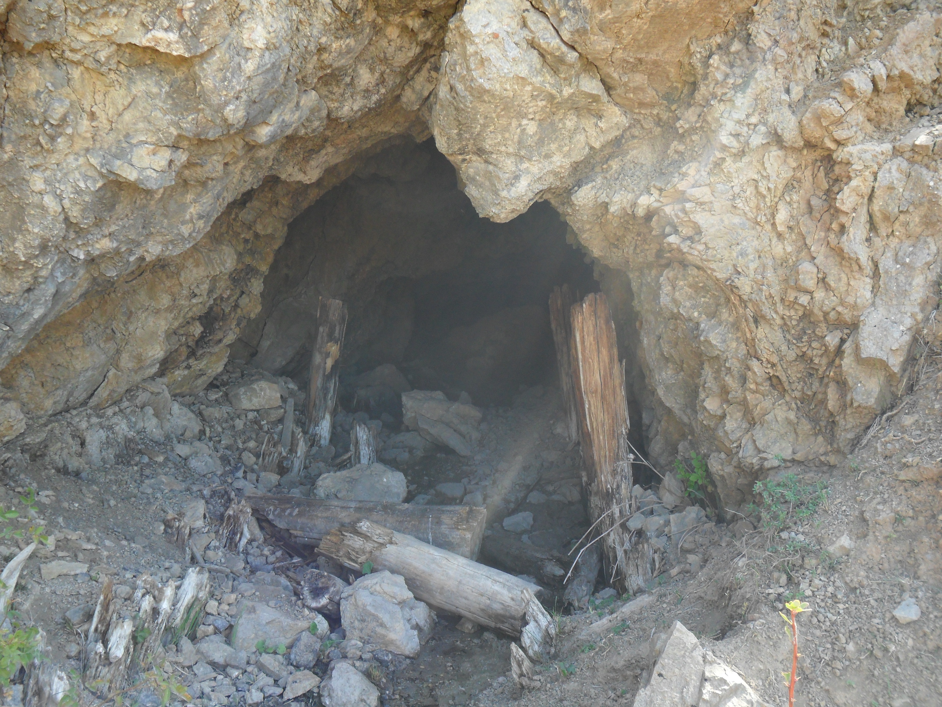 Старая штольня в верховьях Каранкульсая. Бостанлыкский район. Ташкентская область.